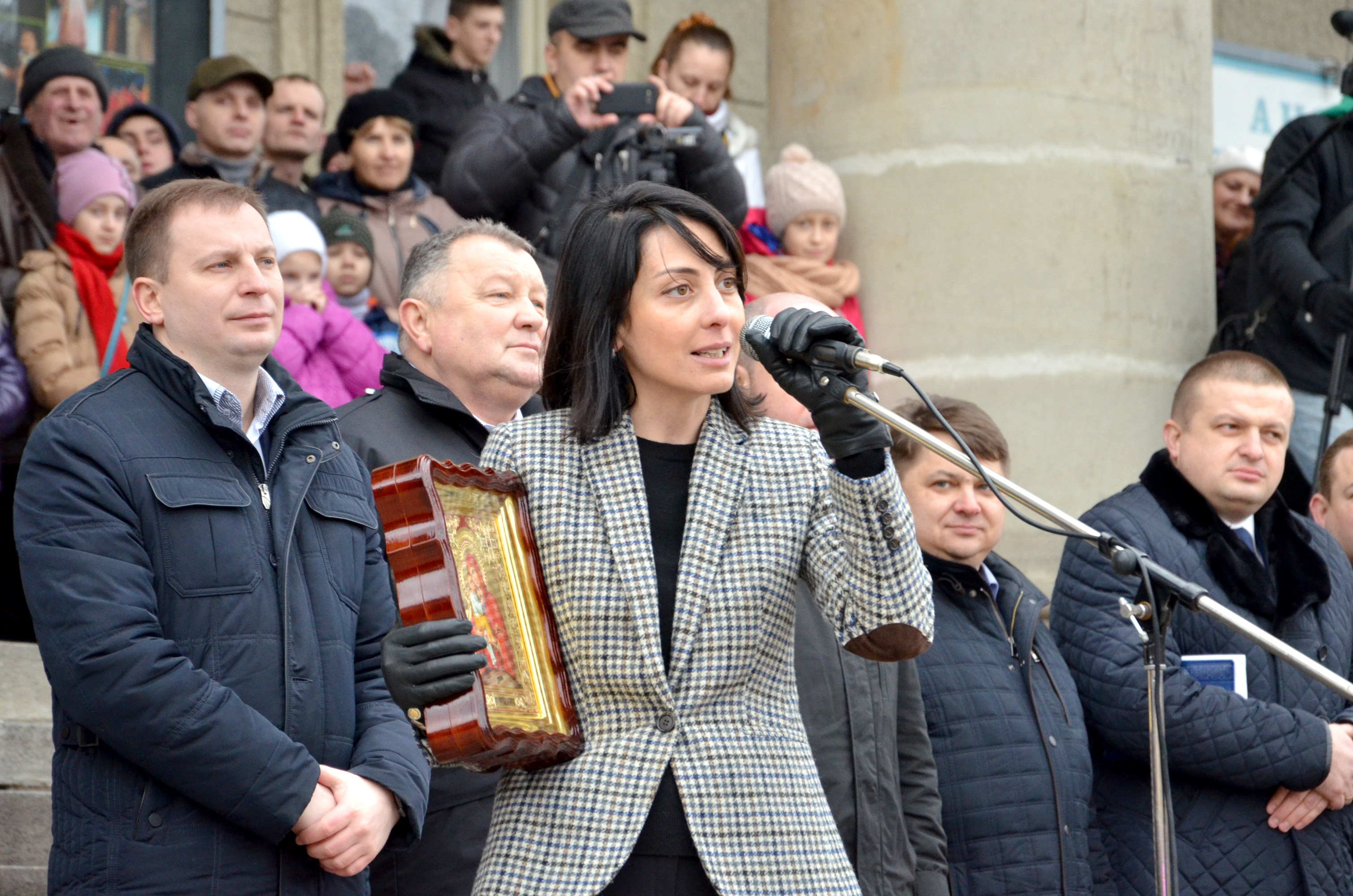 Керівниця Національної поліції України Хатія Деканоідзе під час представлення і присяги нової поліції в Тернополі 12 березня 2016 року.